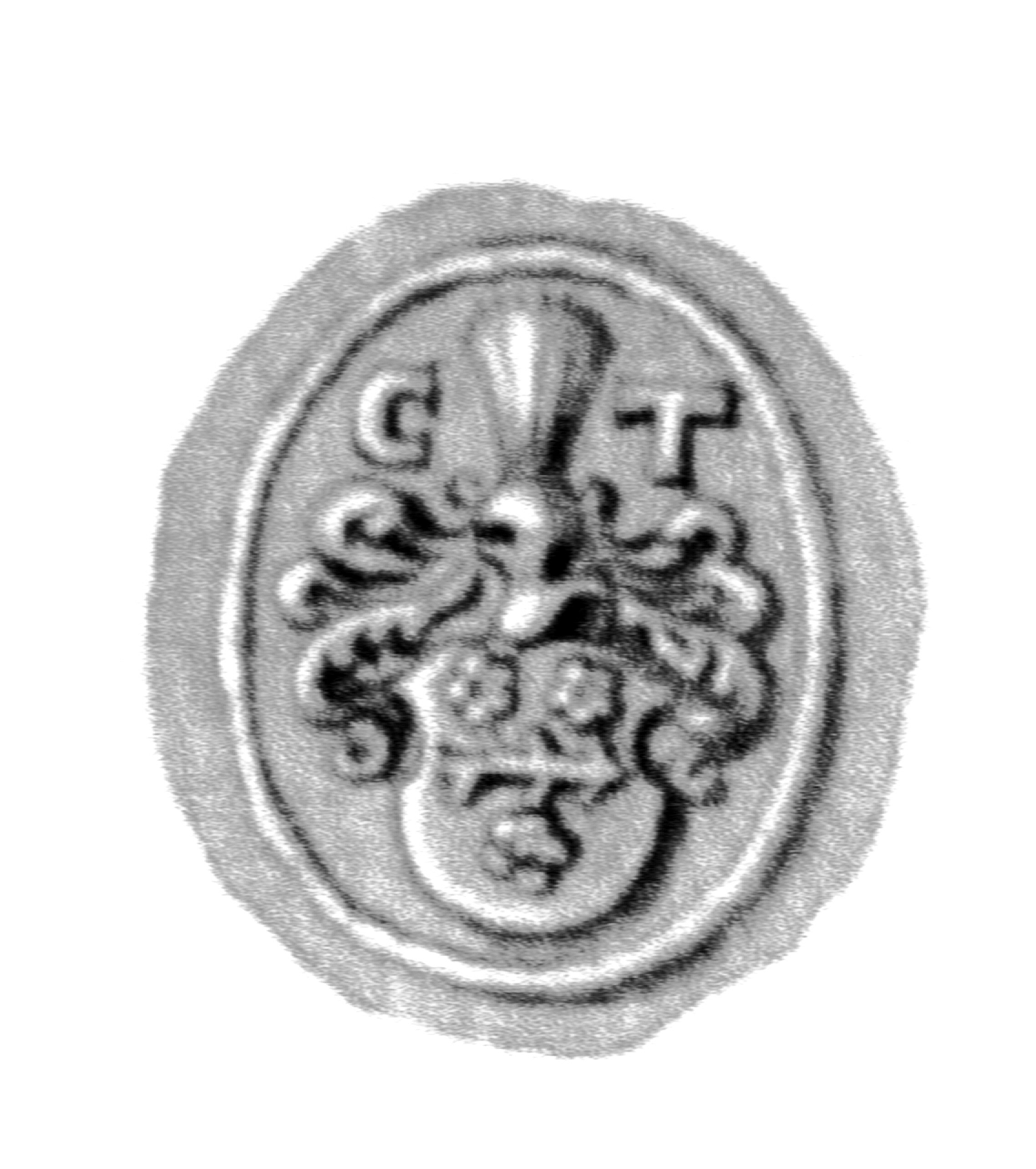 Siegel des Ratsmannes Christoph Tode. Das Siegel stammt aus der Zeit um 1574. Siehe Emil Ferdinand Fehling: Lübeckische Ratslinie, Nr. 663 (Christoph Tode, BM).